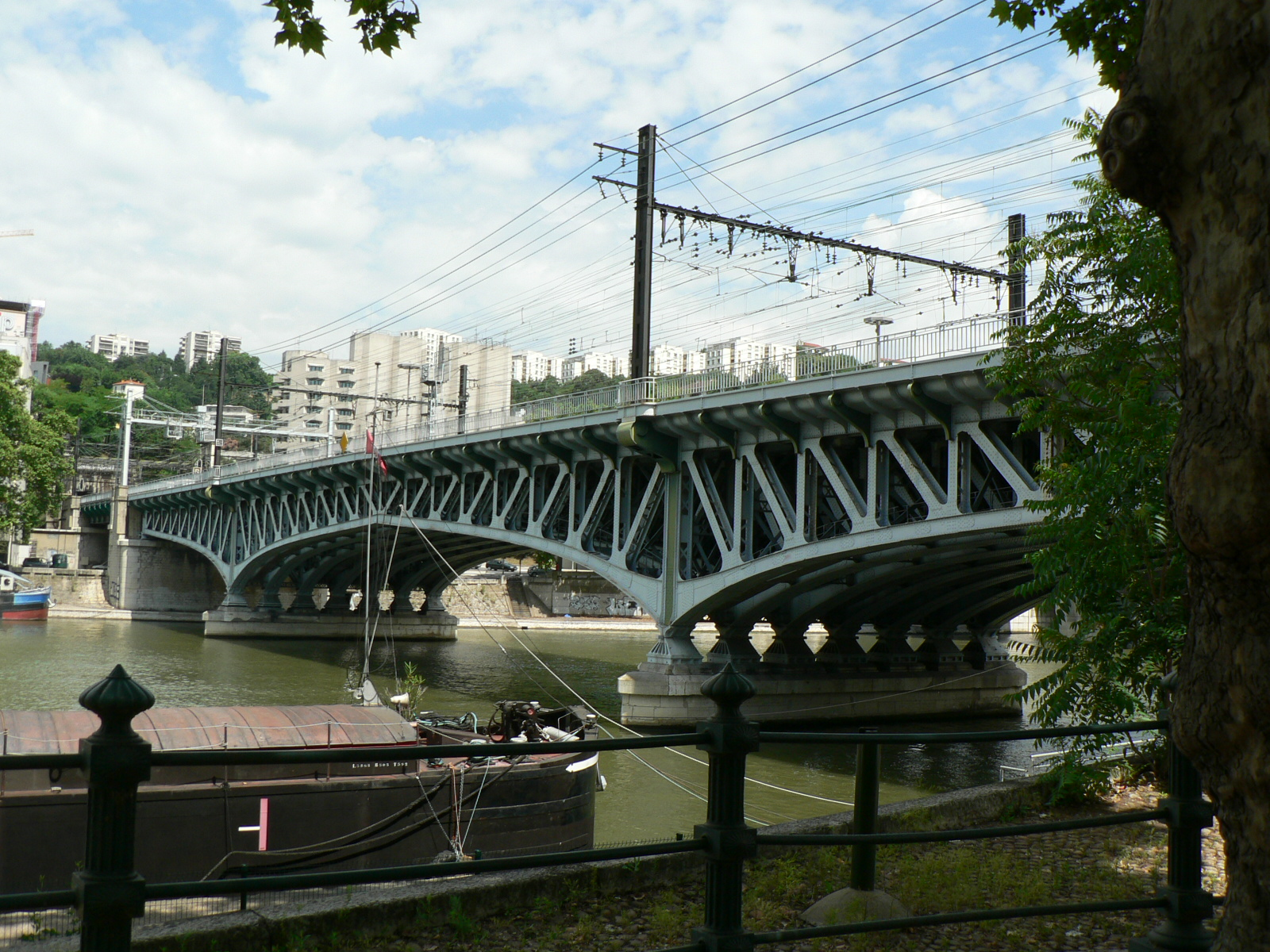 Ponts de Lyon- Viaduc de la Quarantaine (Perrache)